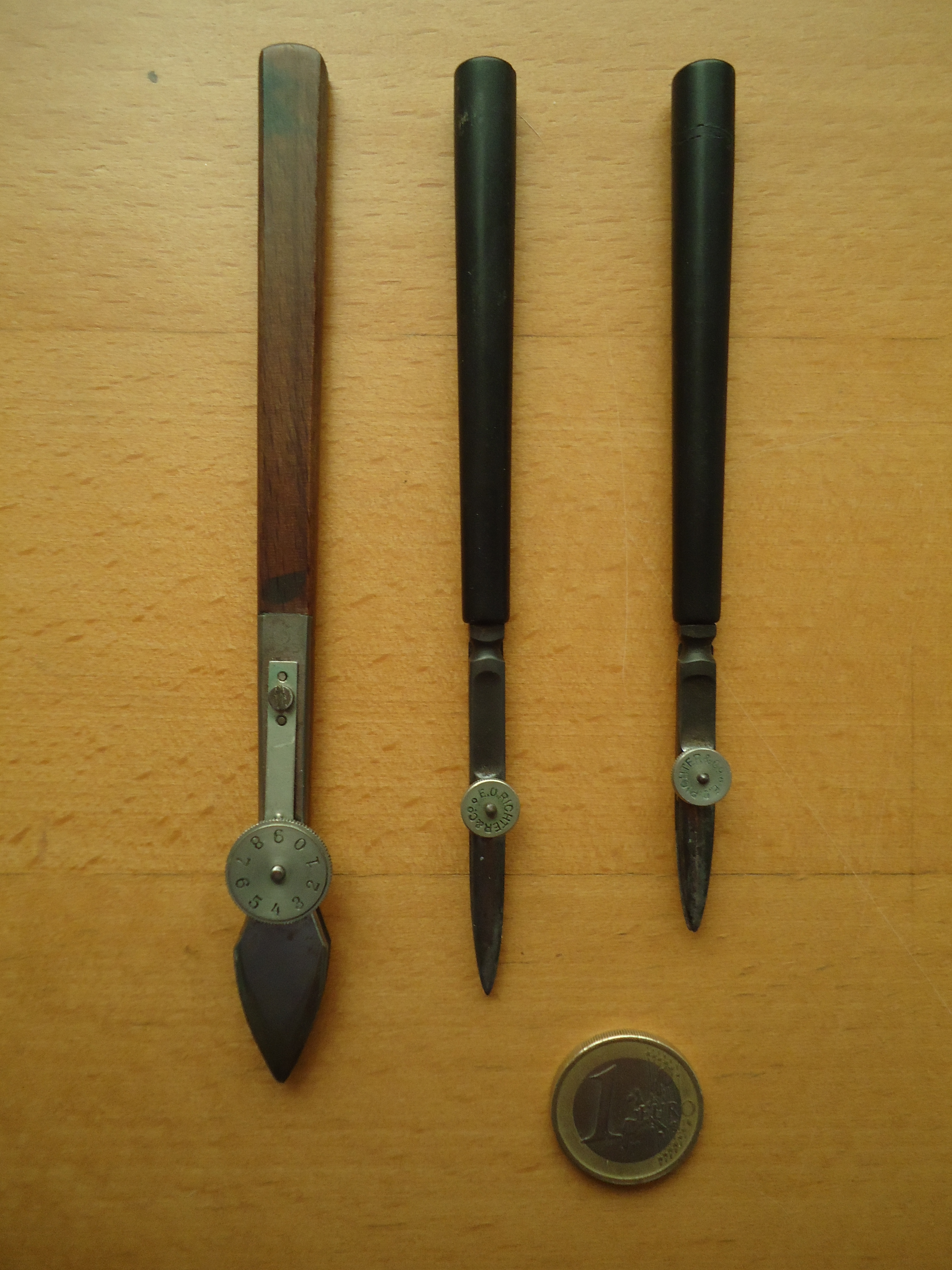 Caja de compases (E.O. Richter&Co). Conjunto de tiralíneas